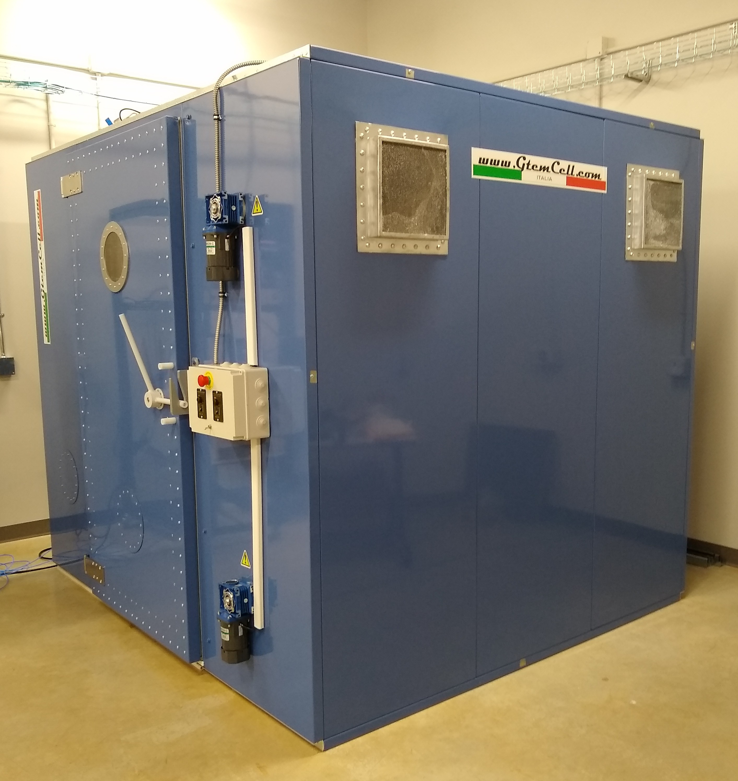 Camera riverberante a due stirrer con velocita' variabile